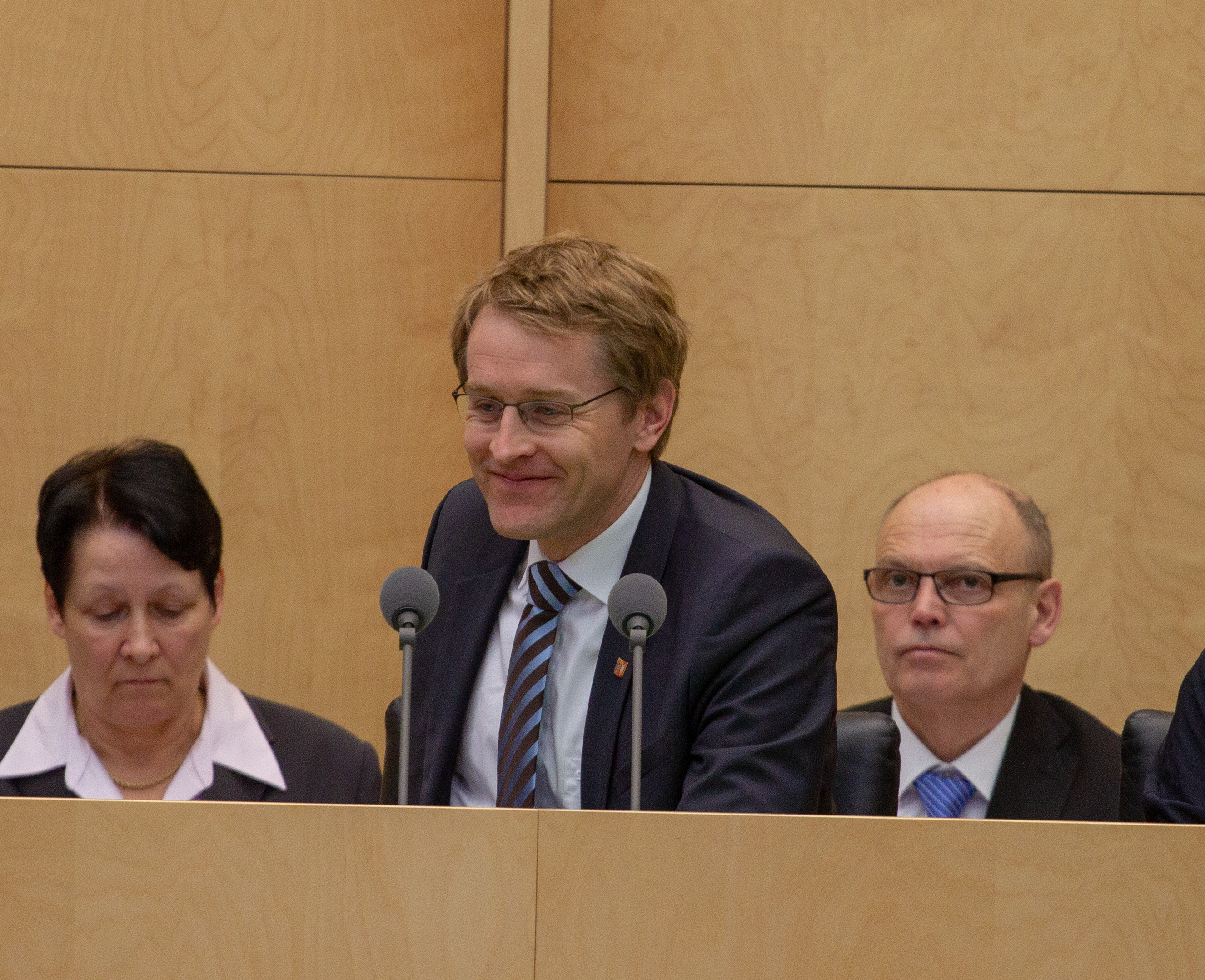 Plenarsitzung des Bundesrates am 12. April 2019 in Berlin.